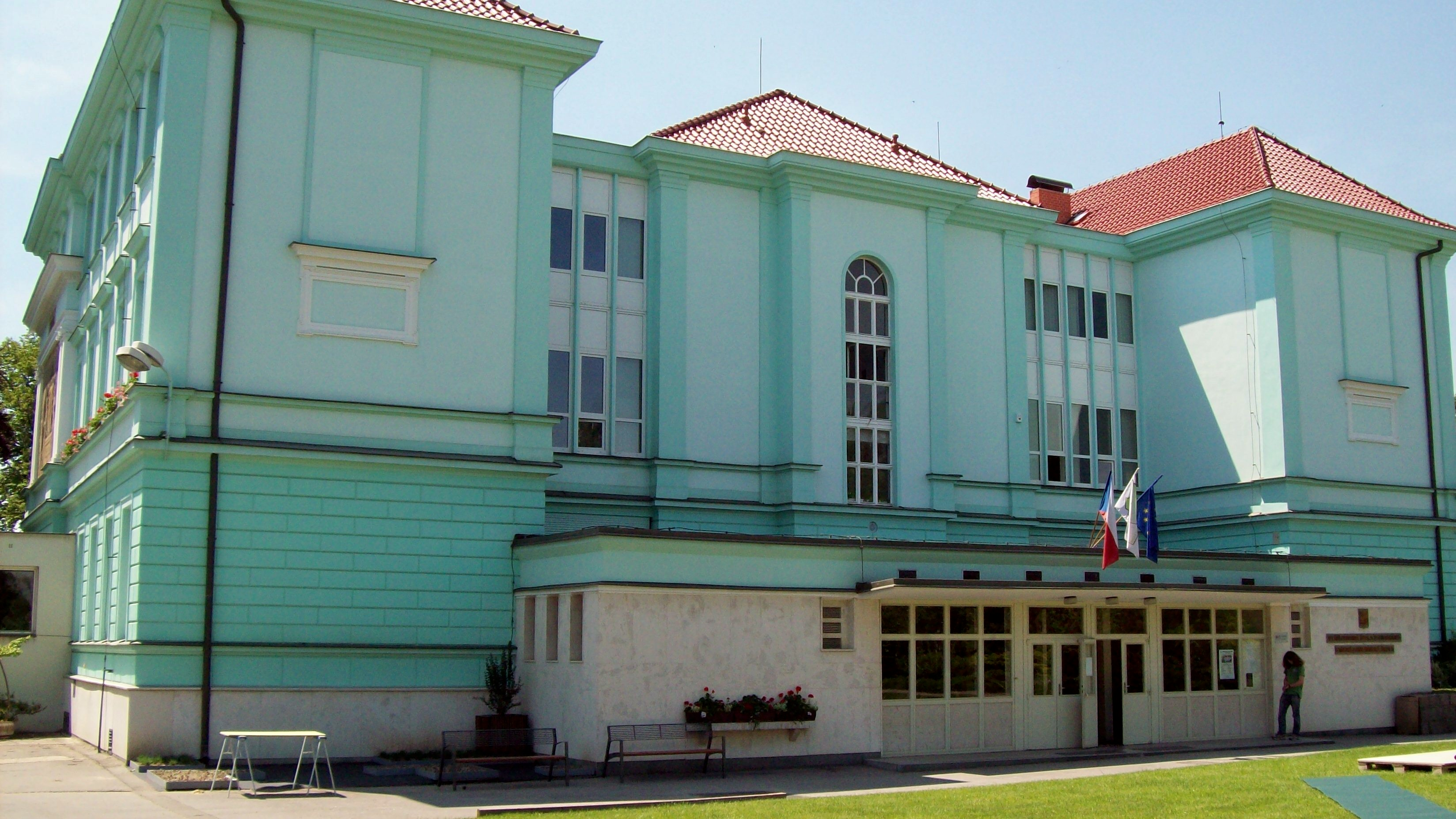 Vyšší odborná škola zahradnická a Střední zahradnická škola Mělník, ul. Na Polabí 411.